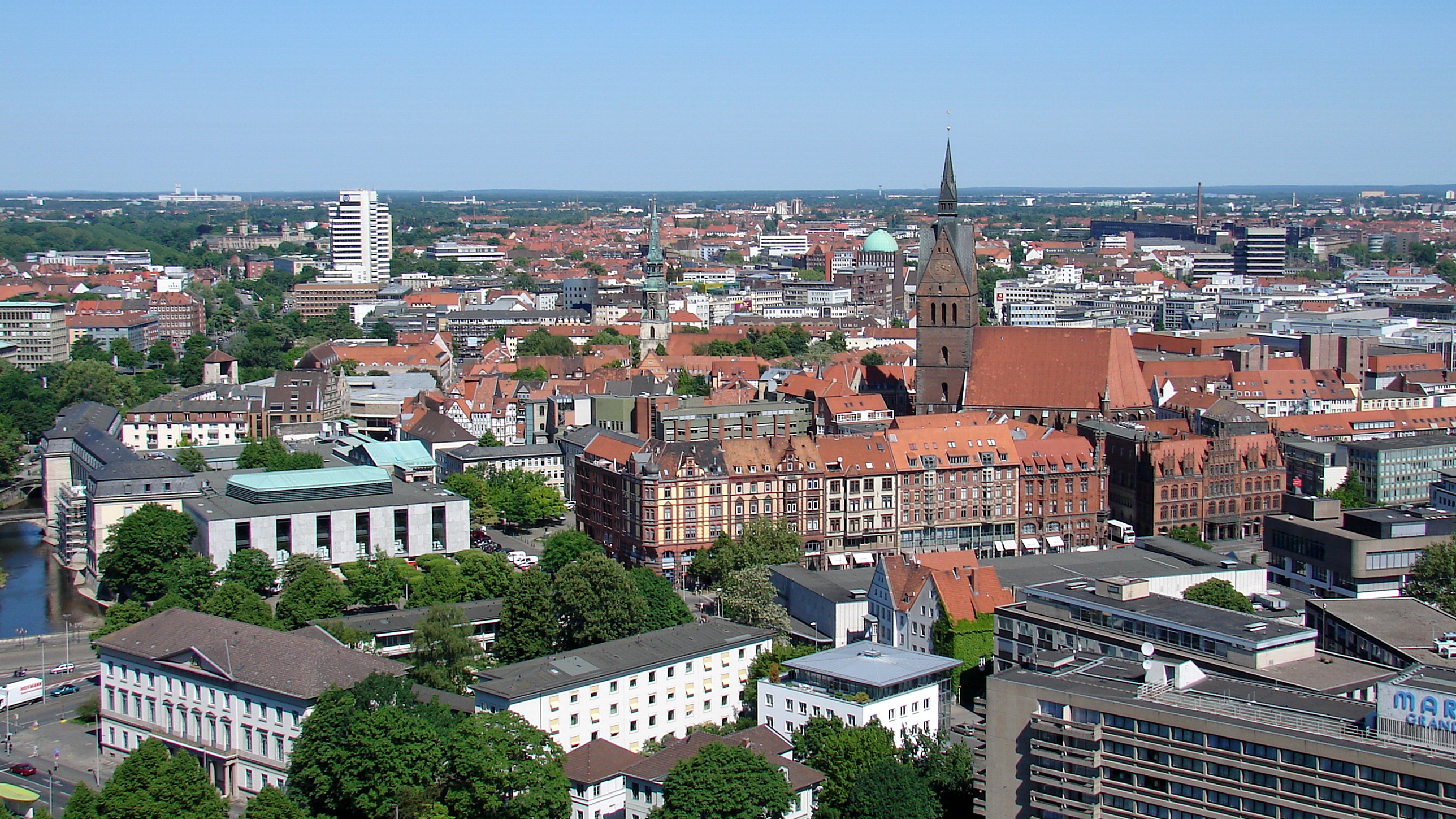 Blick auf Hannover von der Kuppel des Neuen Rathauses.